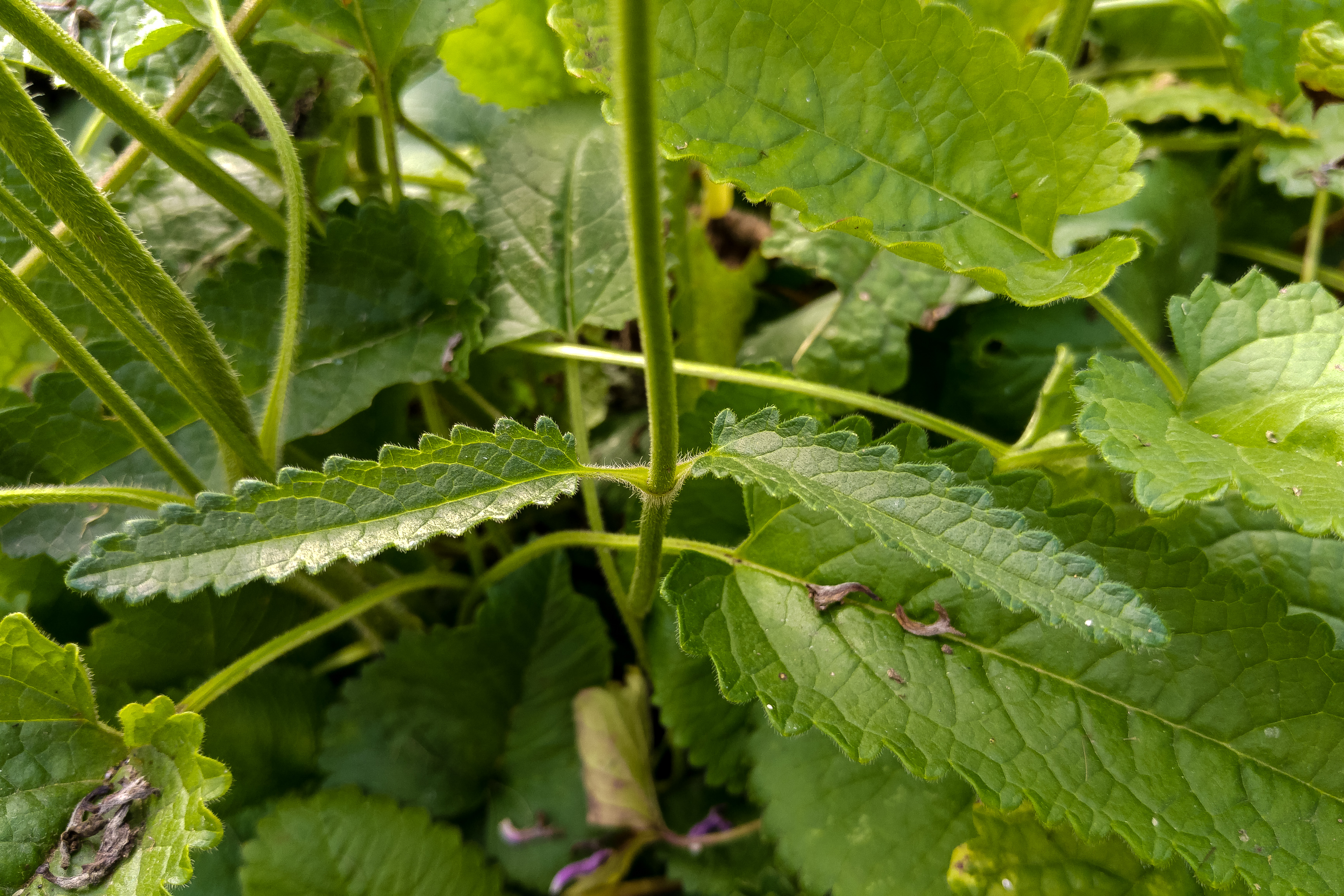 Der Heilziest, die Echte Betonie, lat.: Betonica officinalis oder Stachys betonica